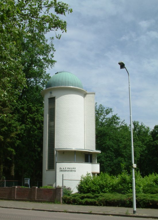 Het dr. A Philips Observatorium aan de rand van het stadswandelpark in Eindhoven